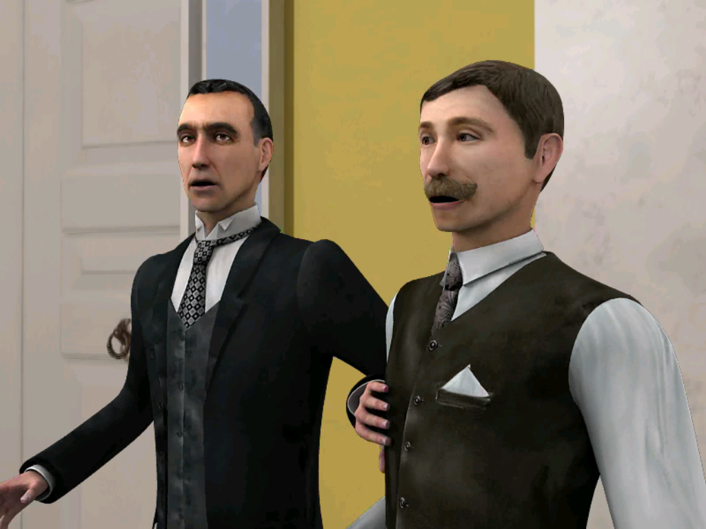 Capture d'écran du jeu Sherlock Holmes : La Boucle d'argent. On y voit Sherlock Holmes et le Docteur Watson à Sherringford Hall, encore interloqués par l'assassinat de Sir Bromsby qui vient tout juste de se produire.